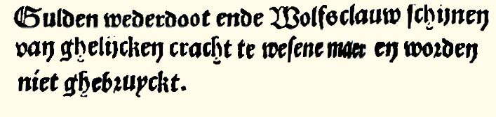 Gulden wederddot ende Wolfclauw schijnen van ghelijcken cracht te wesene maer en worden niet ghebruiyckt. Dodonaeus (1554)